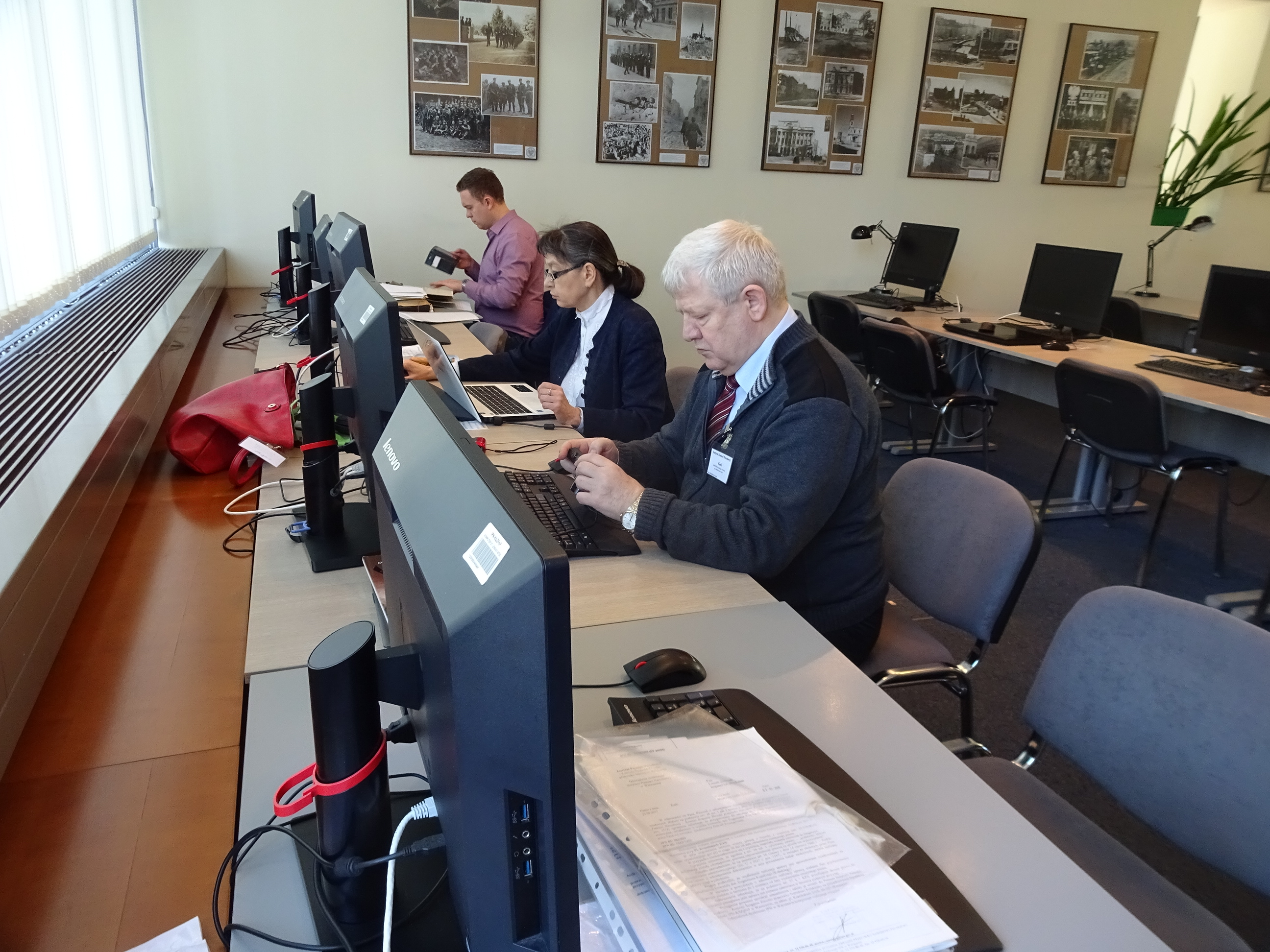 Mirosława Weremiejewicz i ks. Zbigniew Kamiński w czytelni IPN